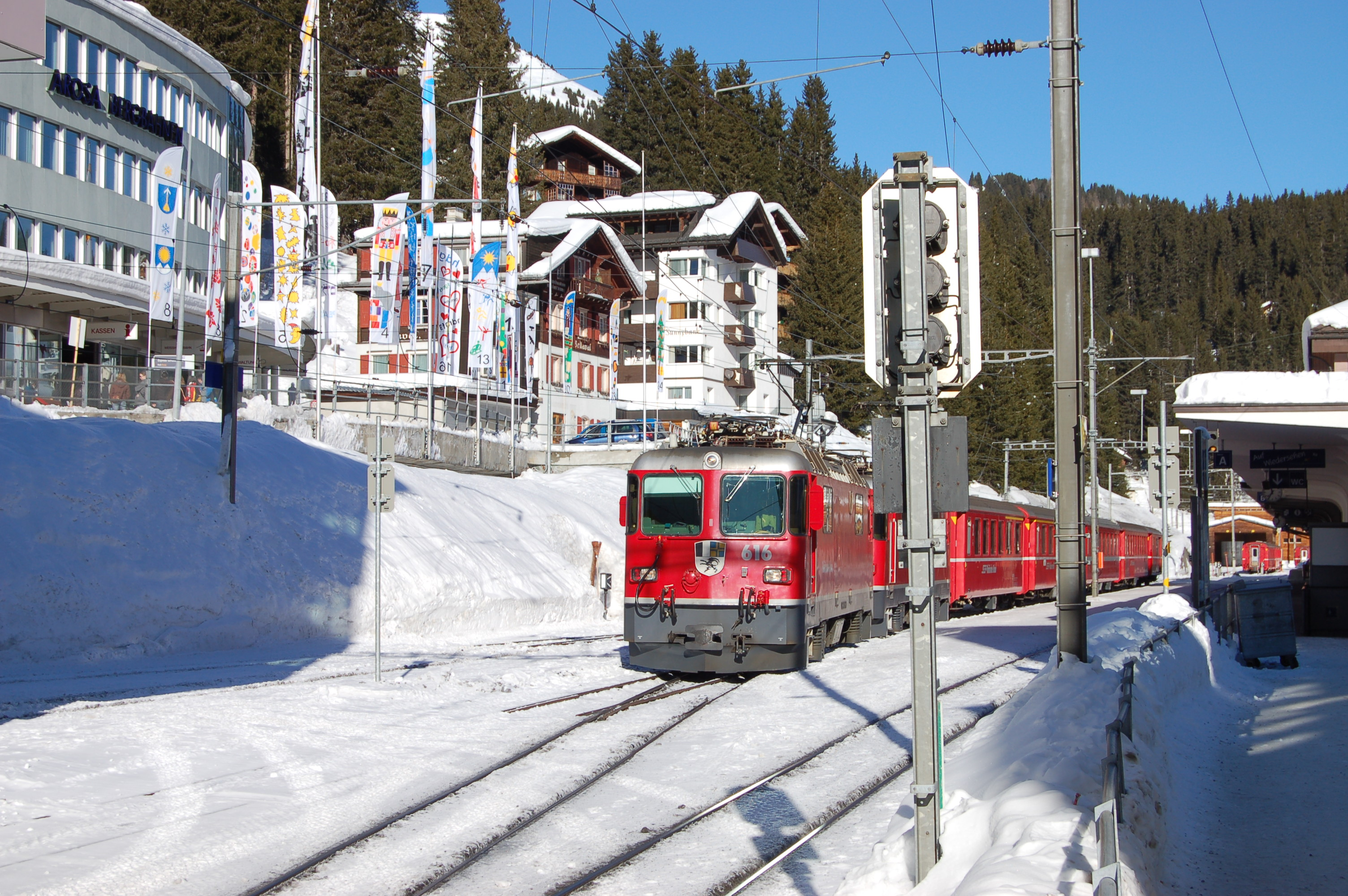 RhB Zug im Bahnhof Arosa, links Talstation der Weisshornbahn